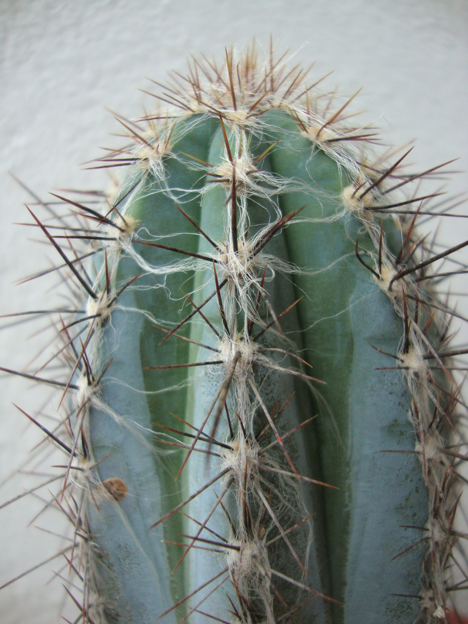 Pilosocereus tweedyanus = Pilosocereus lanuginosus subsp. colombianus